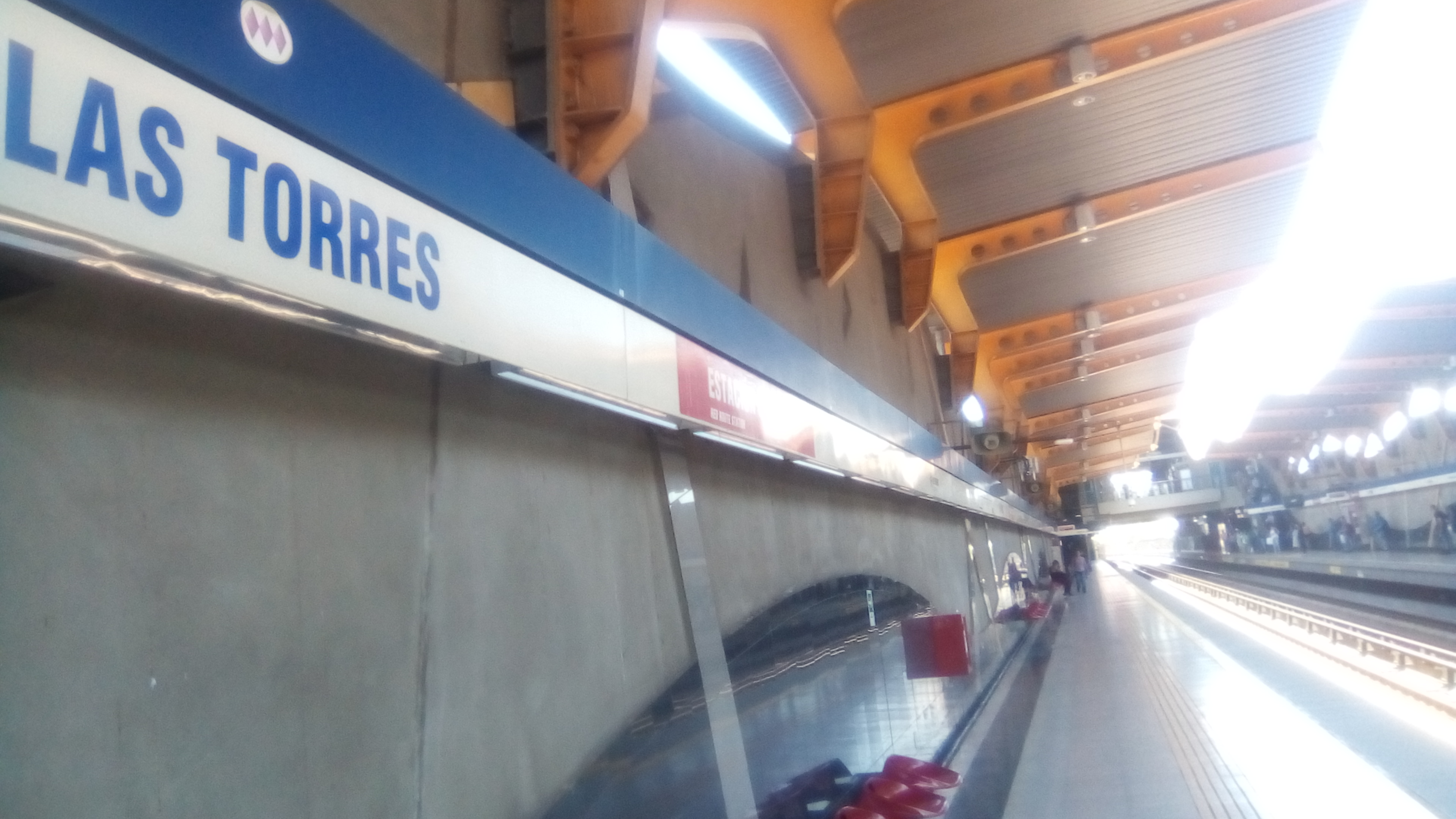 Estación Las Torres (2018)